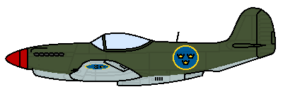 Enkel linjeritning av Saab 27 i paint.